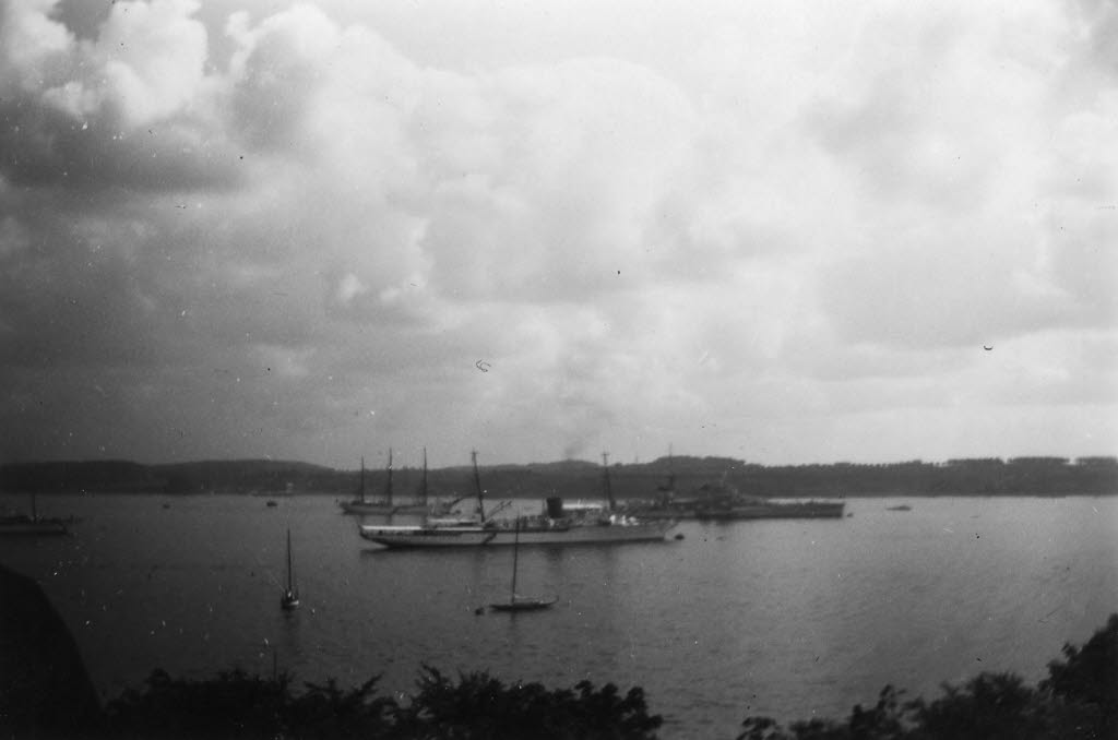 Blick von Bellevue auf den Aviso GRILLE (Bildmitte) und den Schweren Kreuzer GORIZIA (ital.) im Hafen.